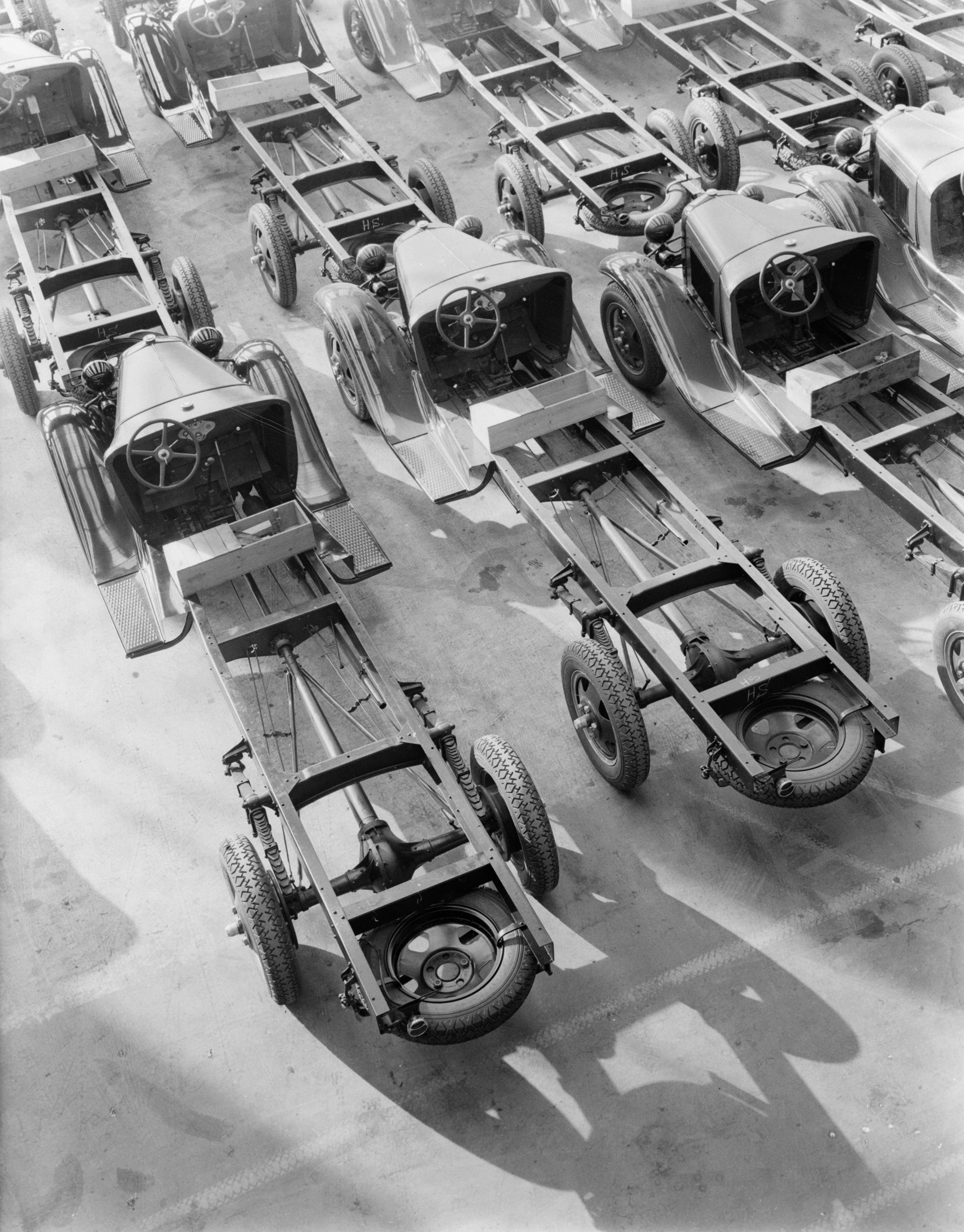 Collectie / Archief : Fotocollectie Van de Poll Reportage / Serie : Ford - Nederland Beschrijving : Chassis van Ford trucks opgesteld t.b.v. assemblage Datum : 1 januari 1932 Locatie : Rotterdam, Zuid-Holland Trefwoorden : assemblage, auto's, oldtimers, vrachtwagens Fotograaf : Poll, Willem van de Auteursrechthebbende : Nationaal Archief Materiaalsoort : Glasnegatief Nummer archiefinventaris : bekijk toegang 2.24.14.02 Bestanddeelnummer : 252-0948